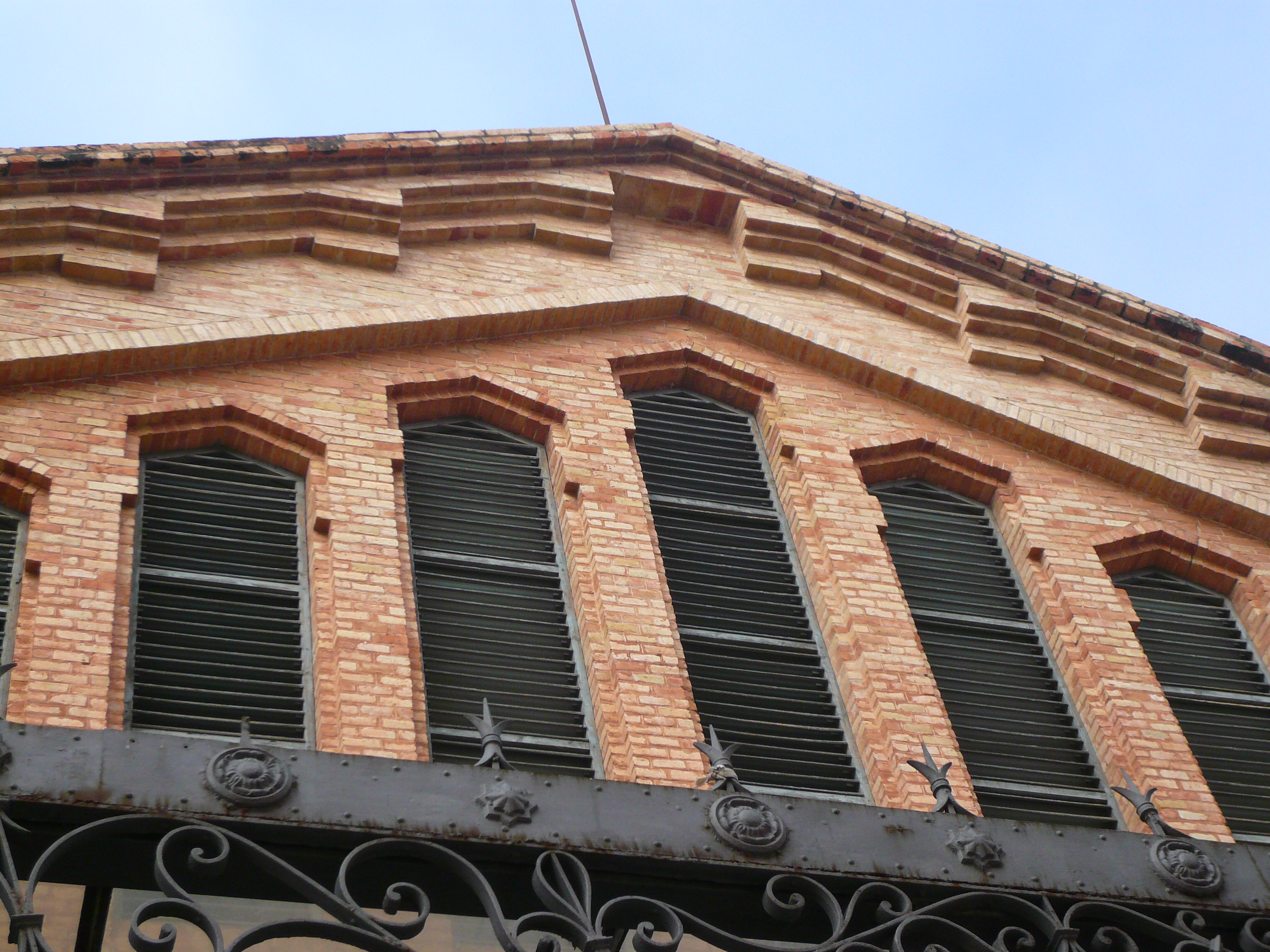 Mercat (Sitges) Object location41° 14′ 07.31″ N, 1° 48′ 42.47″ E